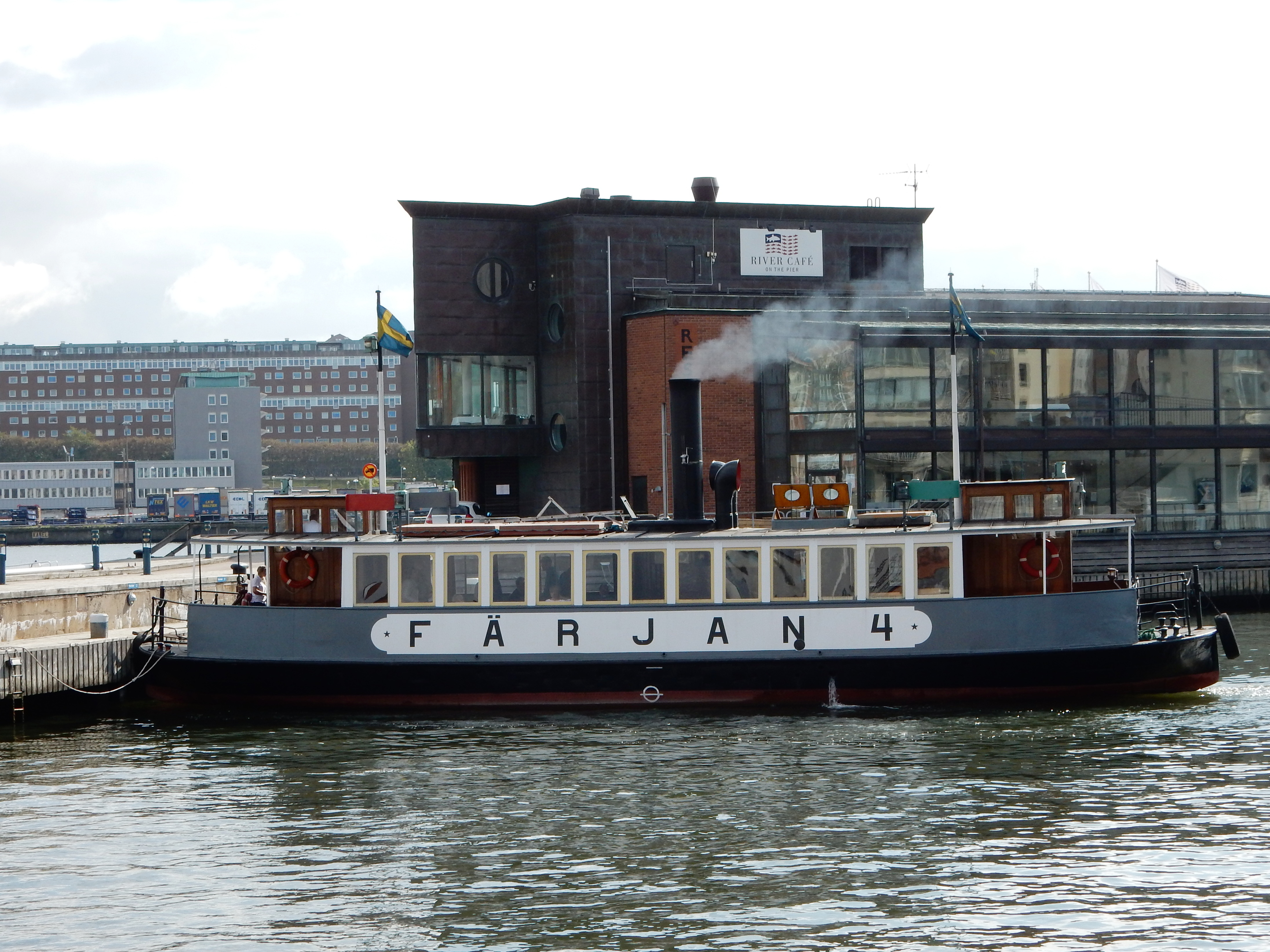 Ångfartyget Färjan 4 vid Eriksberg i Göteborg. This is an image of the protected Swedish ship Färjan 4, with call sign SEID .